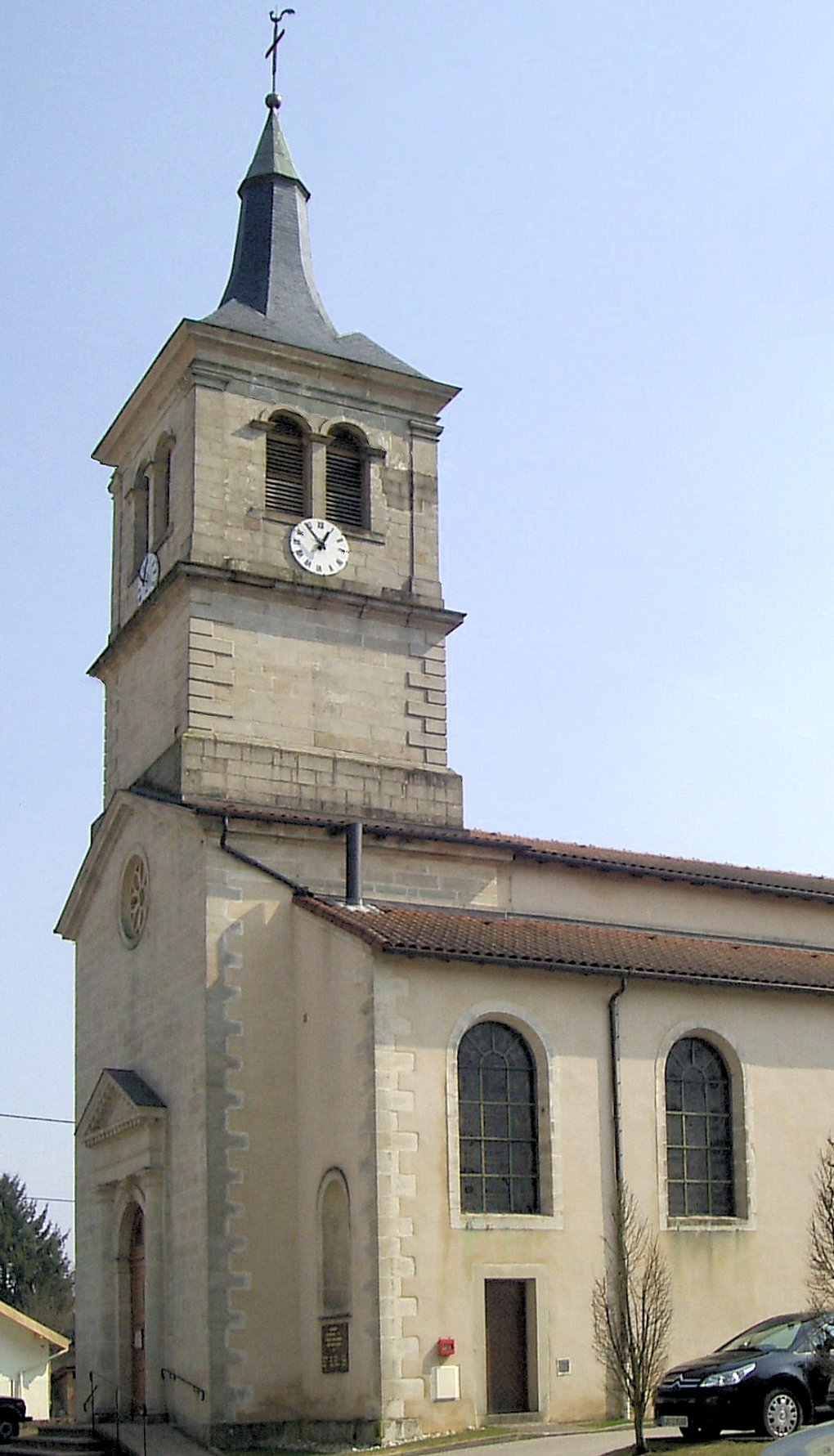 La tour d'église Saint-Léger d'Archettes